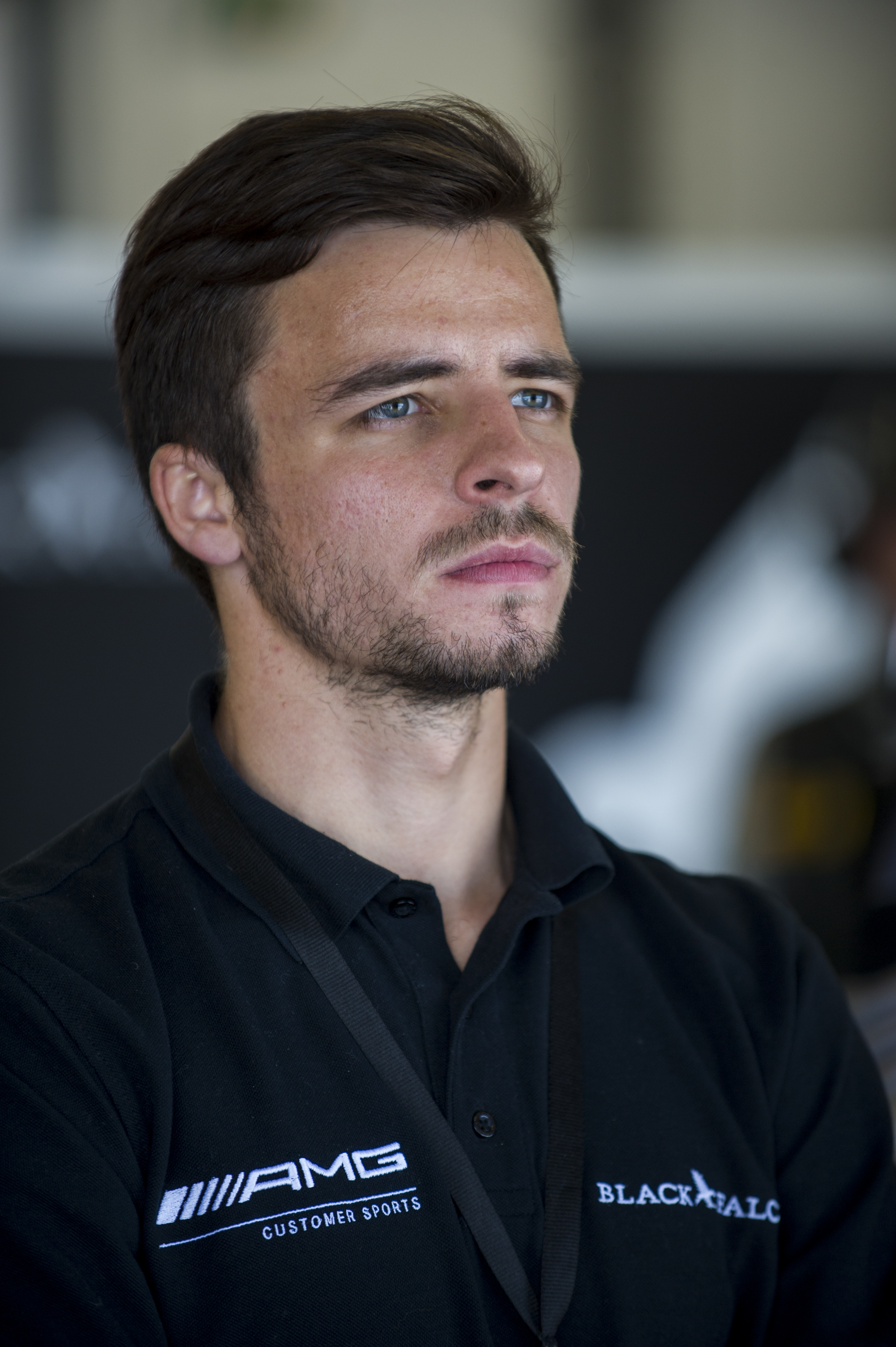 Автогонщик Михаил Лобода